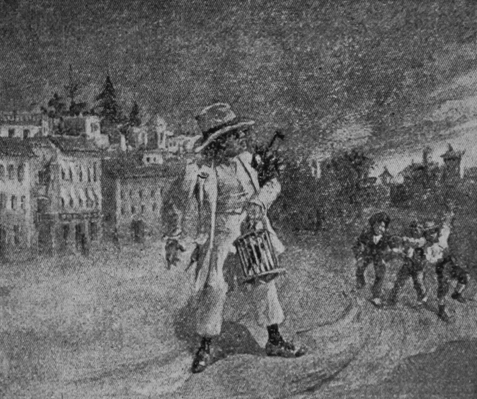 Cabeza de Perro en Tenerife. Ilustración de la novela "Sor Milagros o secretos de Cuba: novela histórica contemporánea ilustrada" de Aurelio Pérez Zamora (1897)